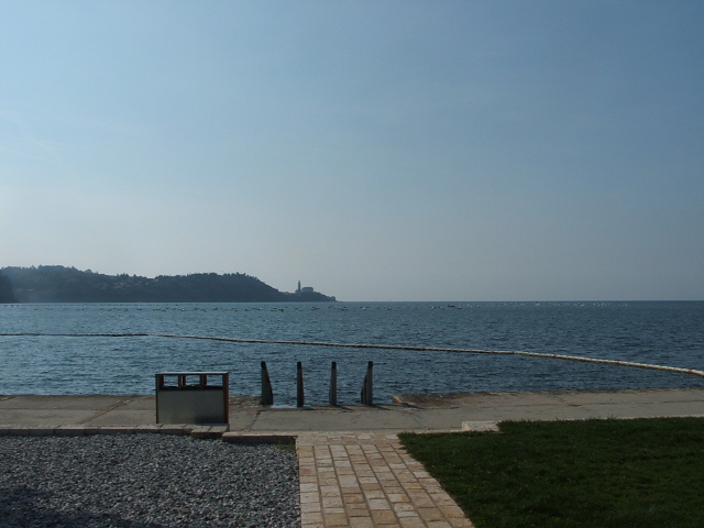 Strunjan